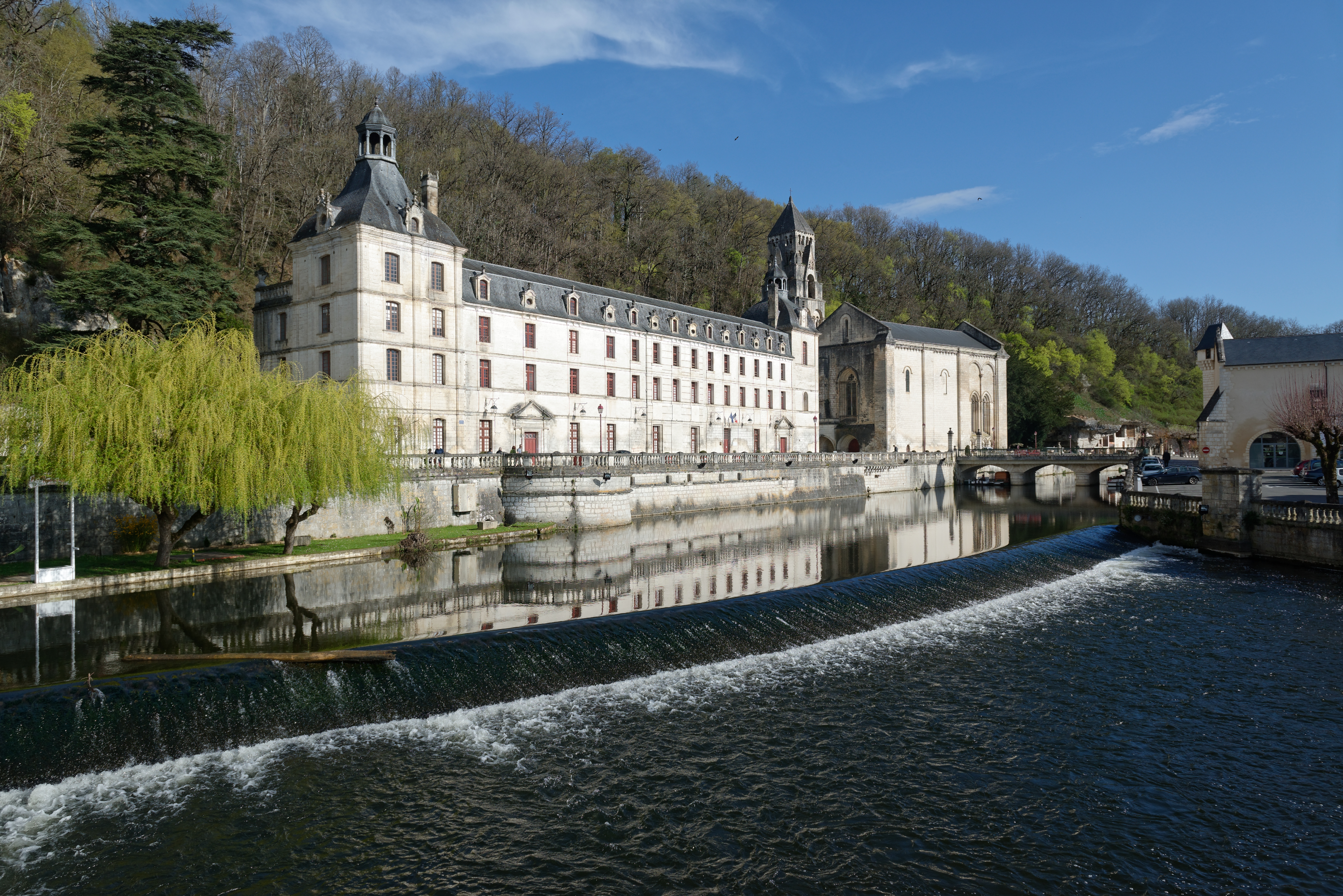 Bâtiments conventuels de l'abbaye Saint-Pierre de Brantôme, dans le département de la Dordogne.